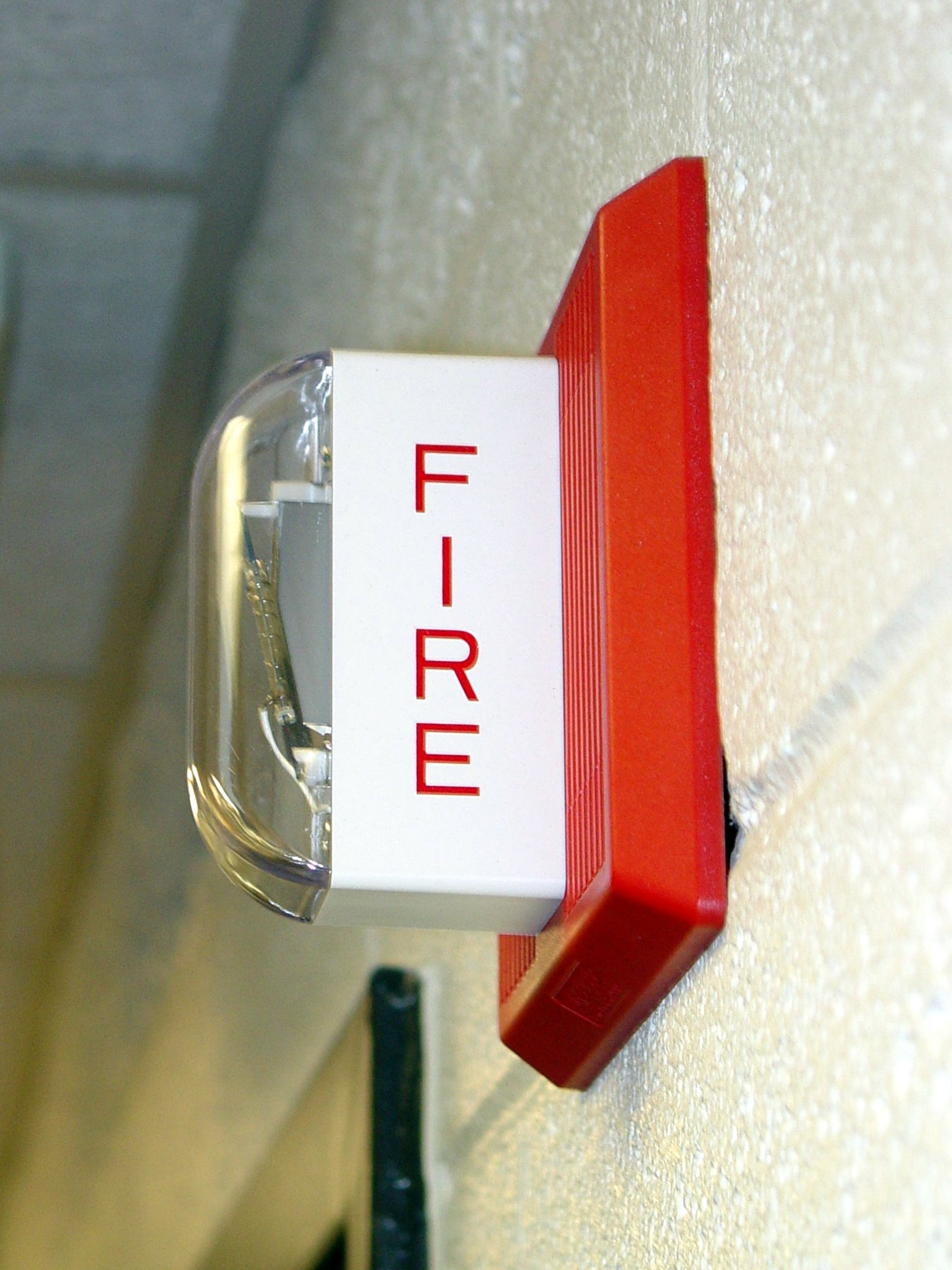 Uno alarma de incendio Wheelock MT-24-LSM fire alarm horn. Photographed by Ben Schumin on November 23, 2002.